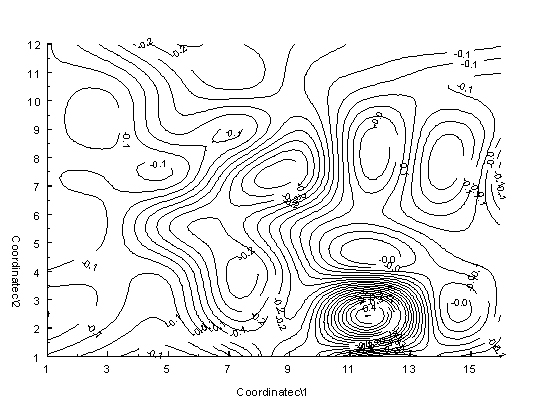 Mappa ECG